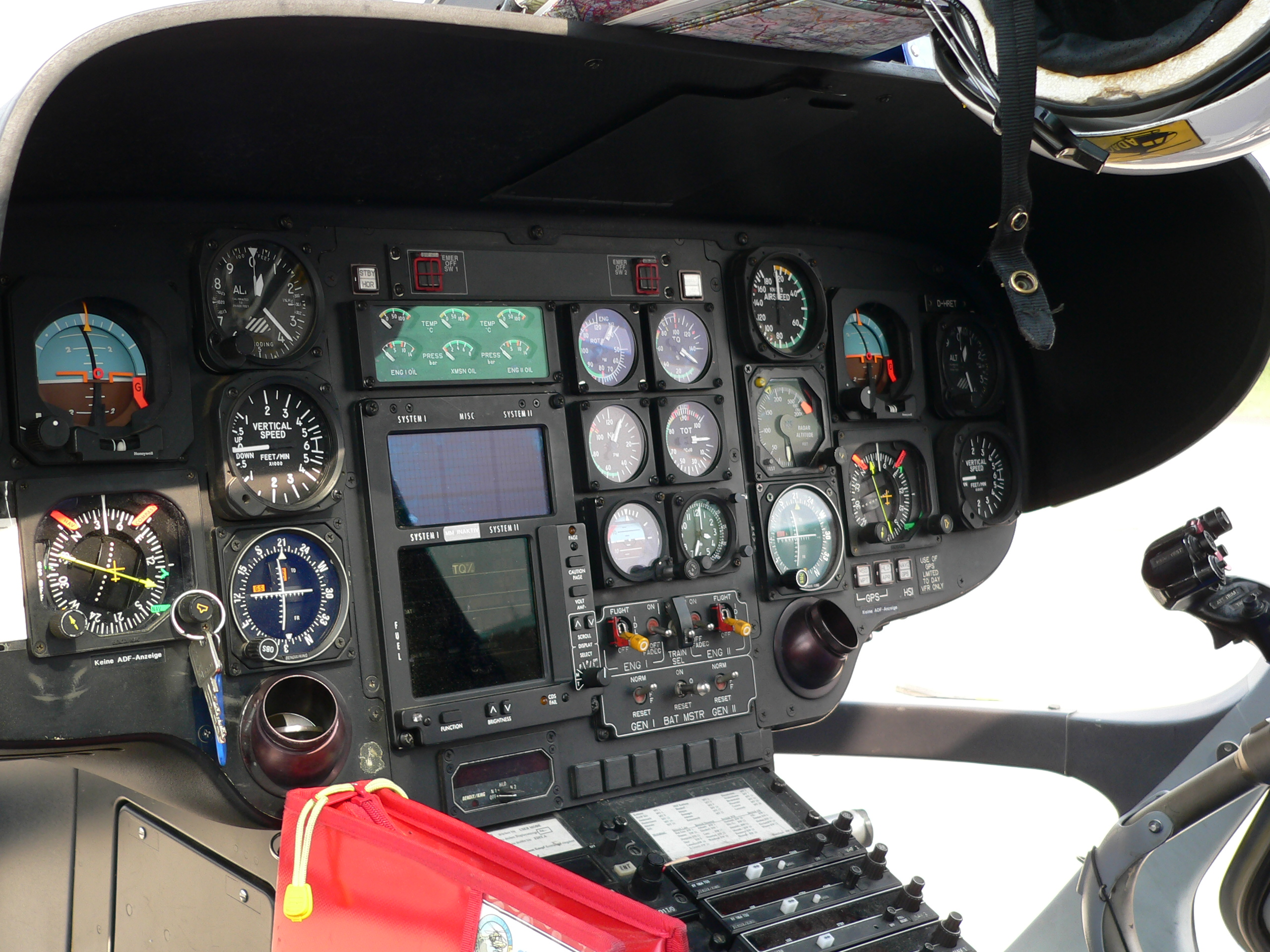 Cockpit EC 135 P1 D-HRET